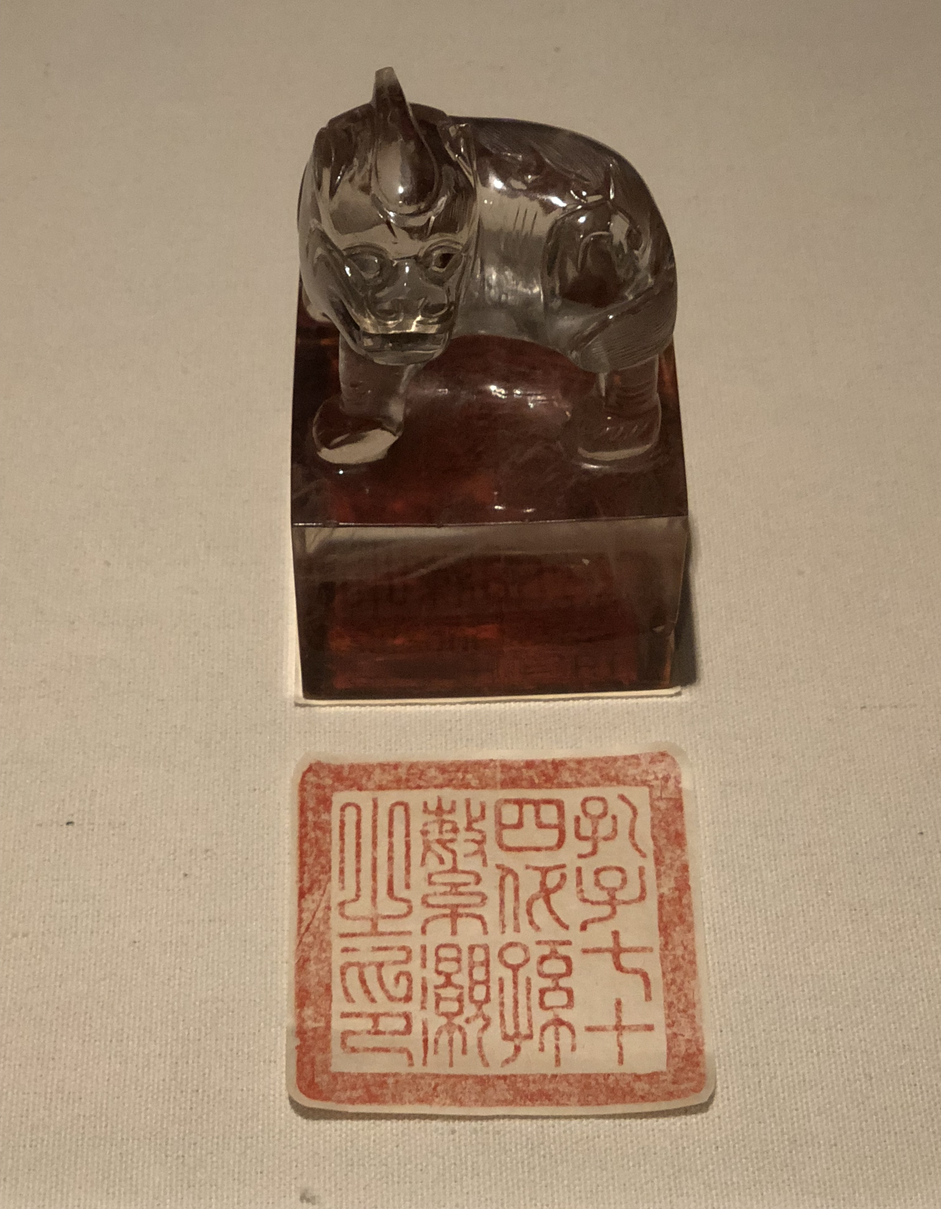 清代 孔府旧藏 印面刻“孔子七十四代孙孔繁灏之印” 一级文物